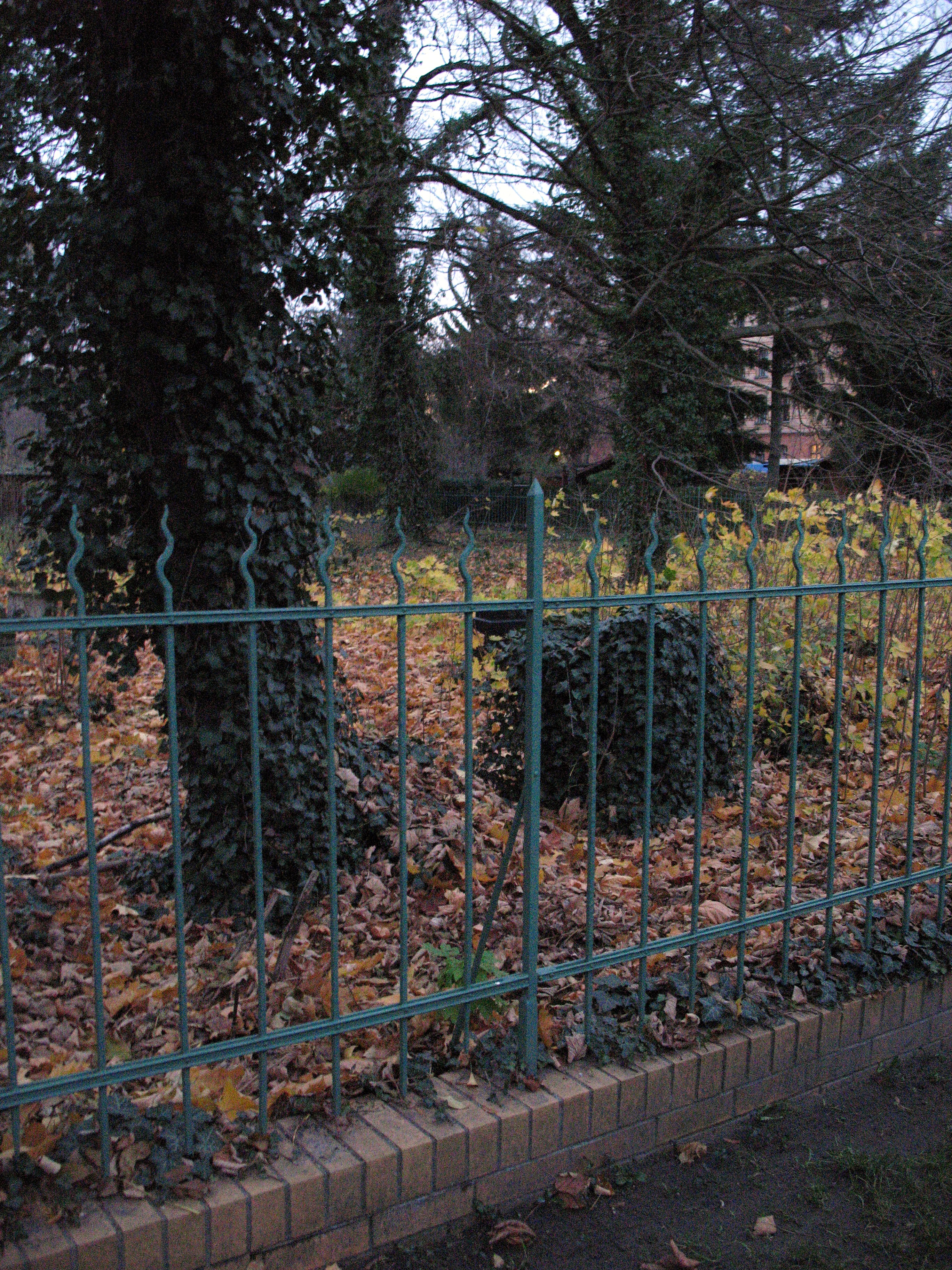 Beamtenfriedhof